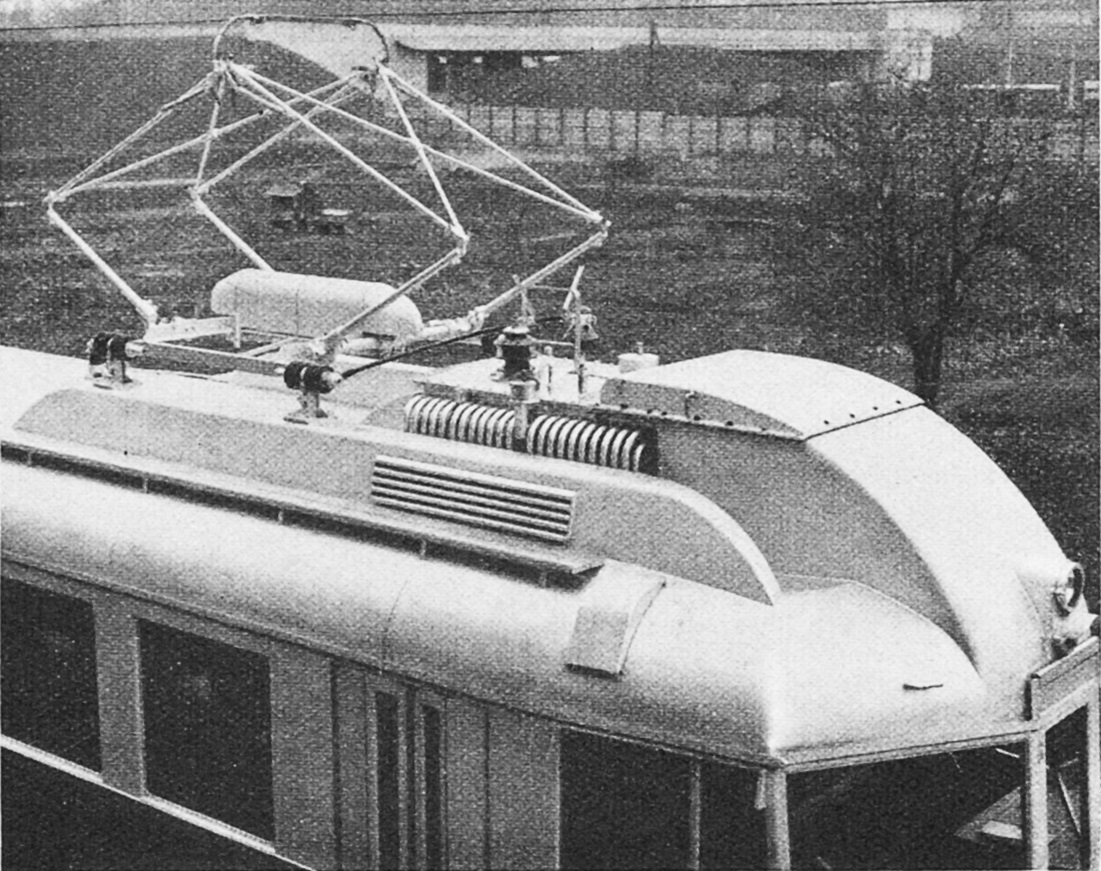 Auf dem Dach platzierter Transformator des BLS BCFZe 4/6